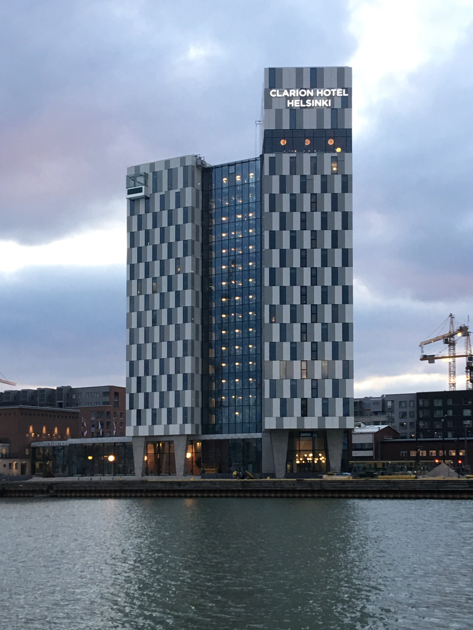 Clarion Hotel Helsinki